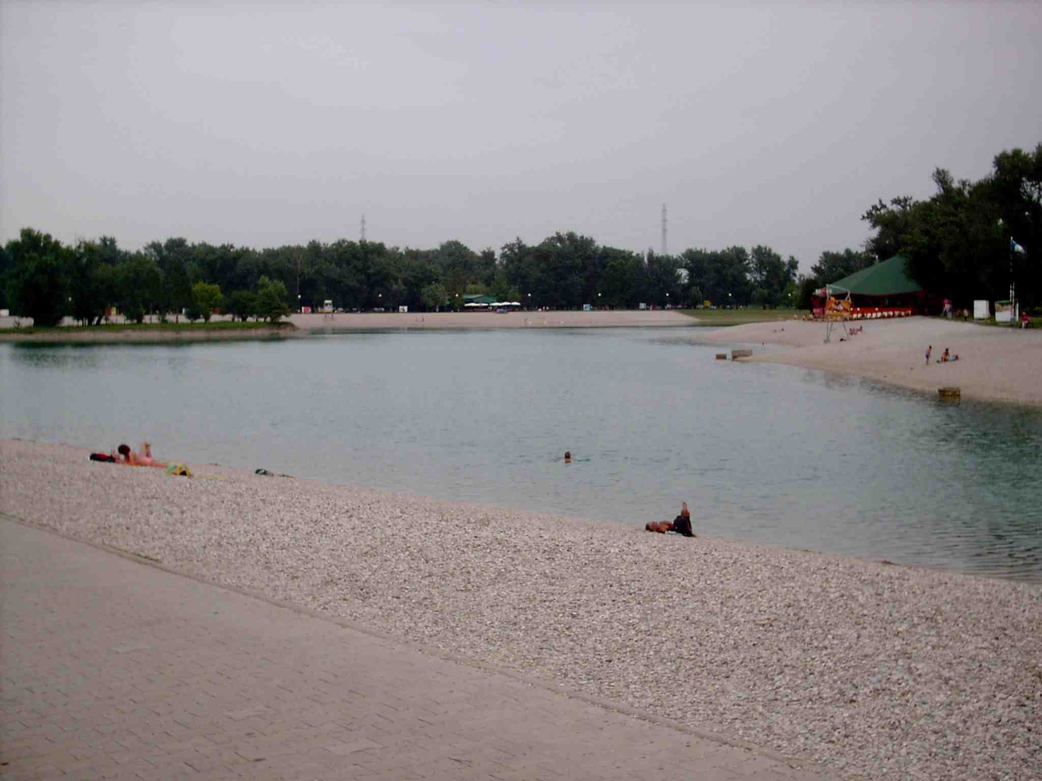 Der Jarun-See